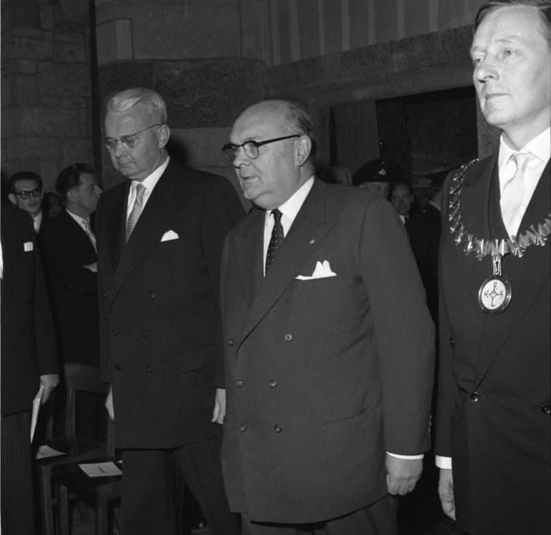 Verleihung des Karlspreises der Stadt Aachen an Paul Henri Spaak im Krönungssaal des Rathauses Information added by Wikimedia users.Original caption: "Bundesarchiv, B 145 Bild F004454-0010Foto: Unterberg, Rolf I 30. Mai 1957" — removed caption